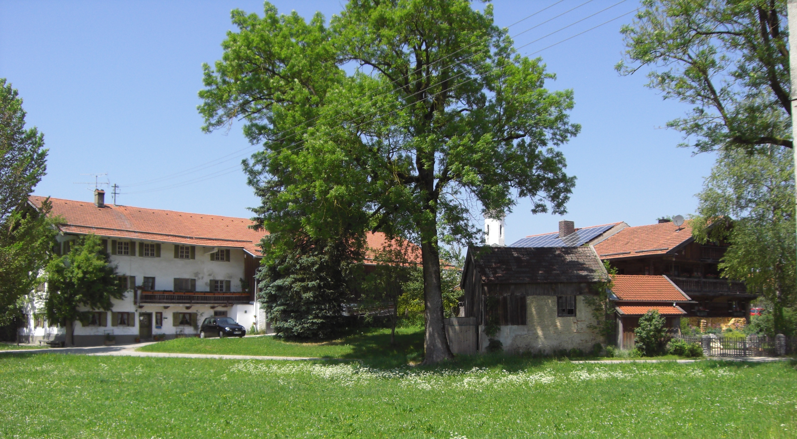 Dorfkern von Baiernrain, Dietramszell, Oberbayern